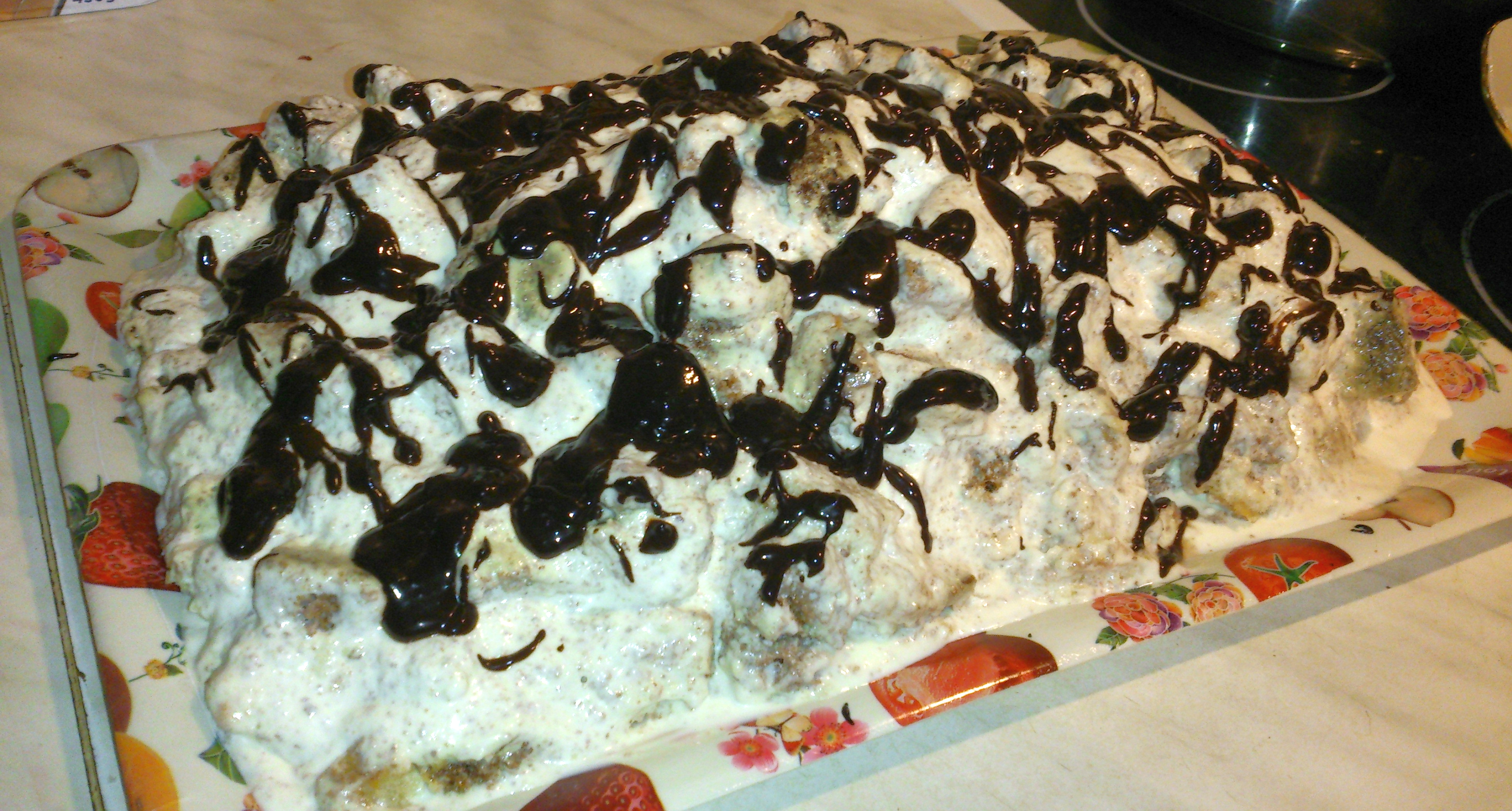 Kräsupeakook